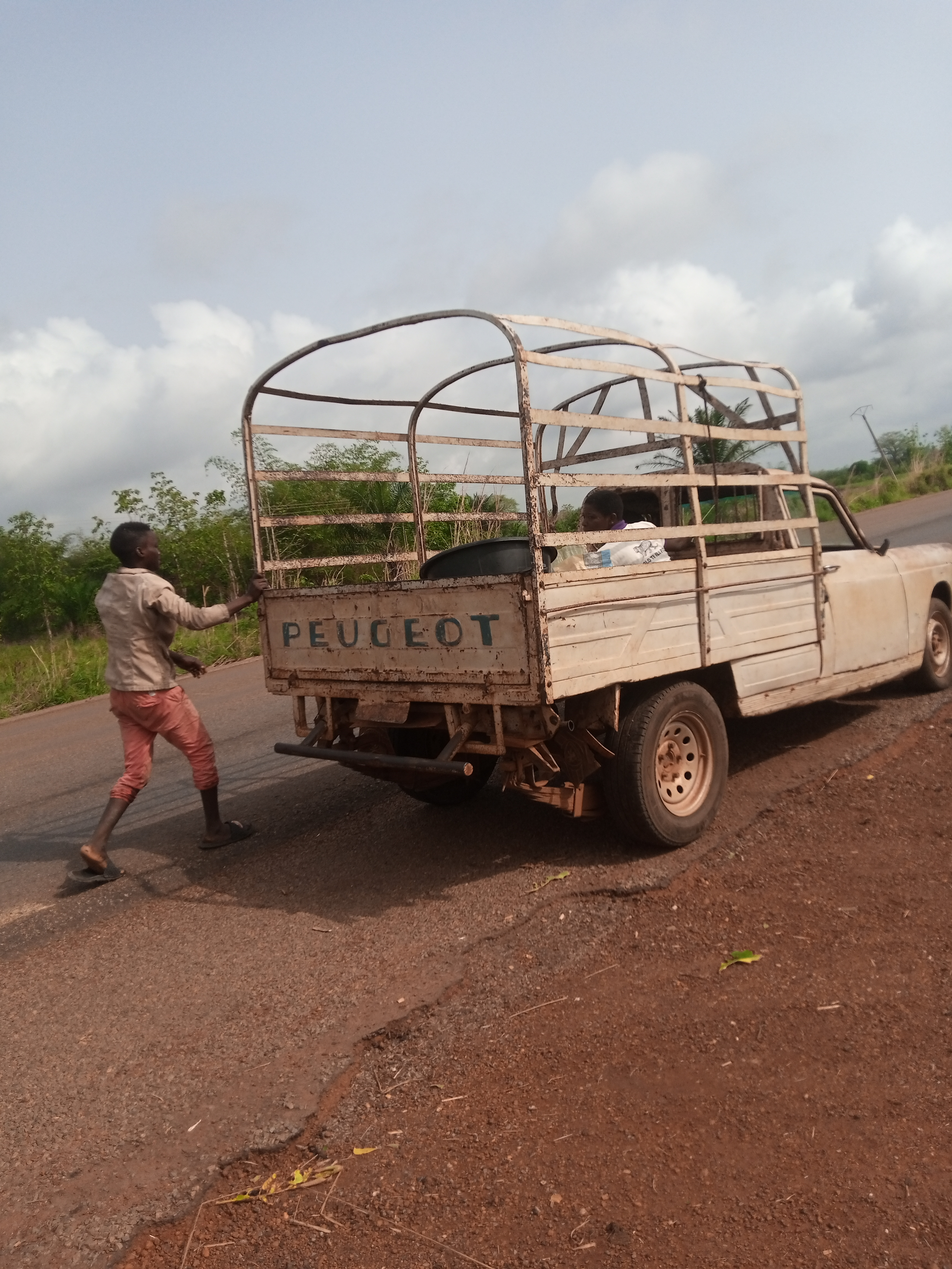 transport à Pobé du Bénin This is an image with the theme "Africa on the Move or Transport" from: Benin